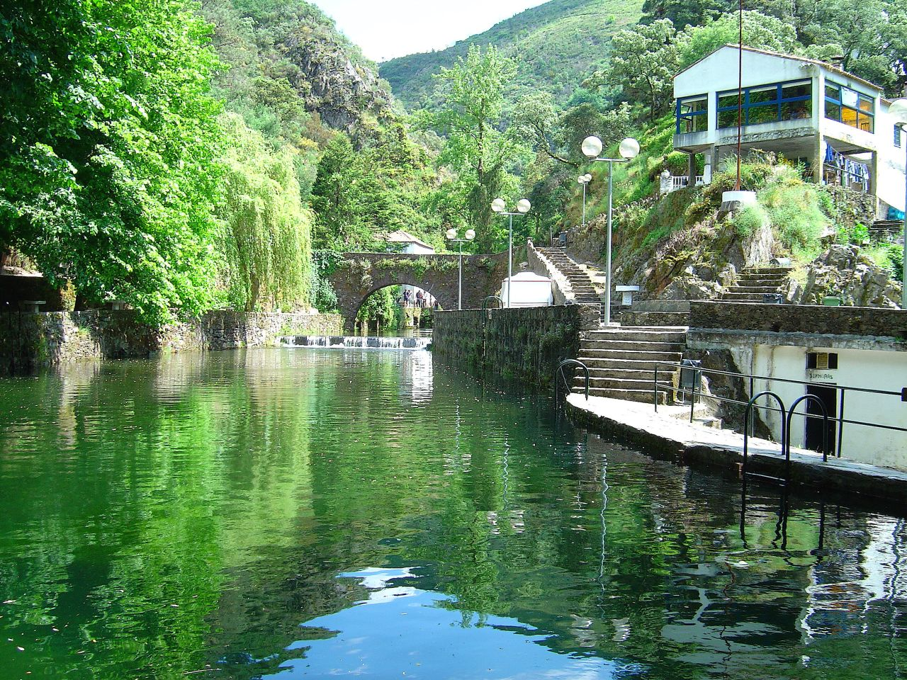 Piscinas Naturais na Lousã - Portugal